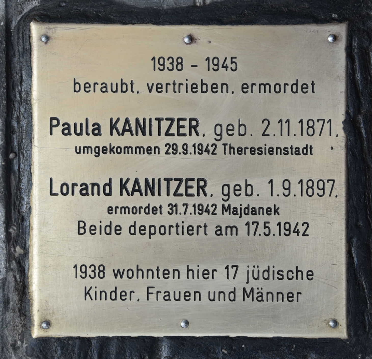 Gedenkstein für Paula und Lorand Kanitzer, 17 jüdische Kinder, Frauen und Männer